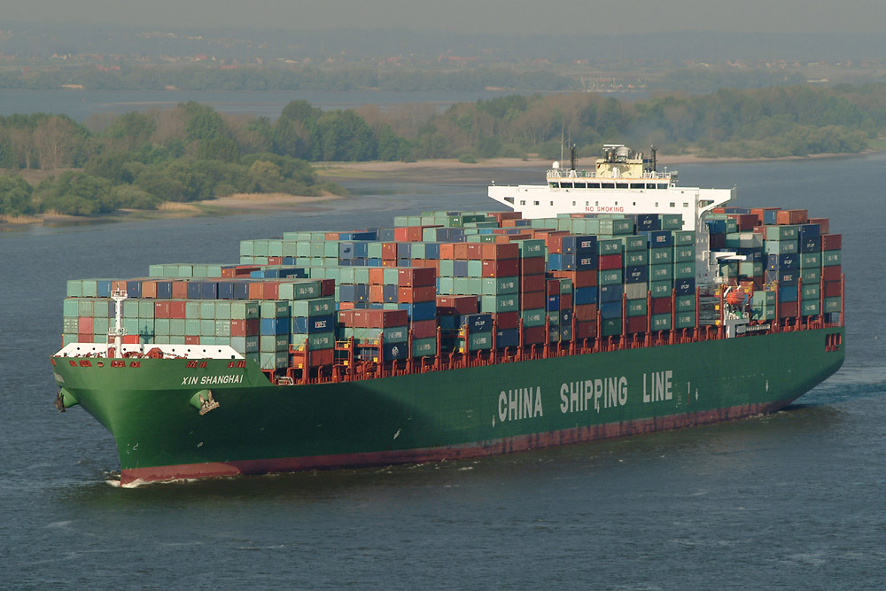 modernes Großcontanershiff XIN SHANGHAI, 9.500 TEU, auf der Elbe vor Hamburg IMO Number: 9307231 MMSI Number: 477282900 Callsign: VRCC6 Length: 337 m Beam: 46 m